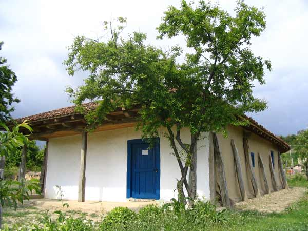 Biserica de paiantă din Izvoarele, Constanţa. Intrarea bisericii după restaurare. Foto: Vlad Calboreanu, 2001.